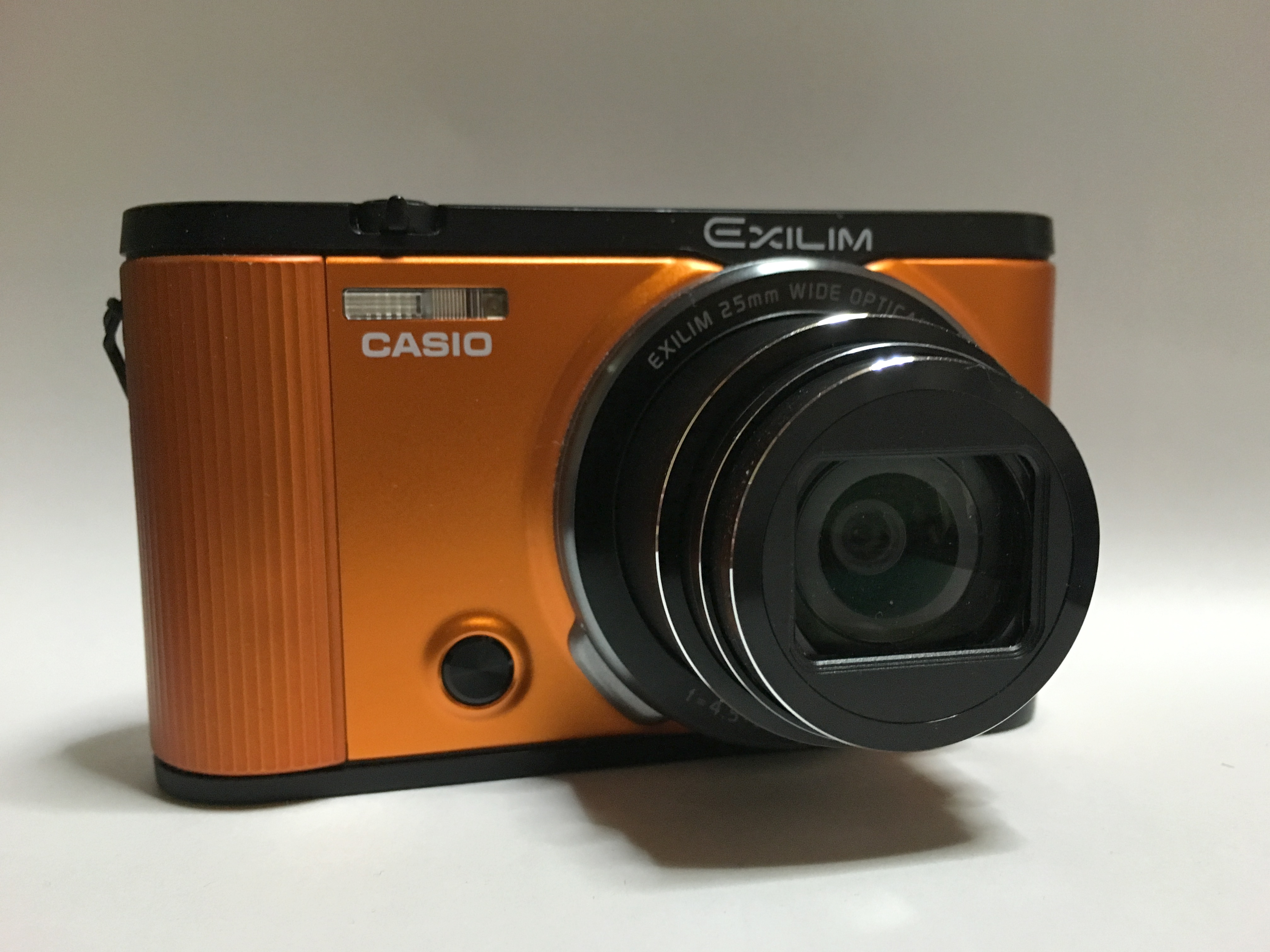 CASIO EXILIM EX-ZR1600（オレンジカラー）の正面。